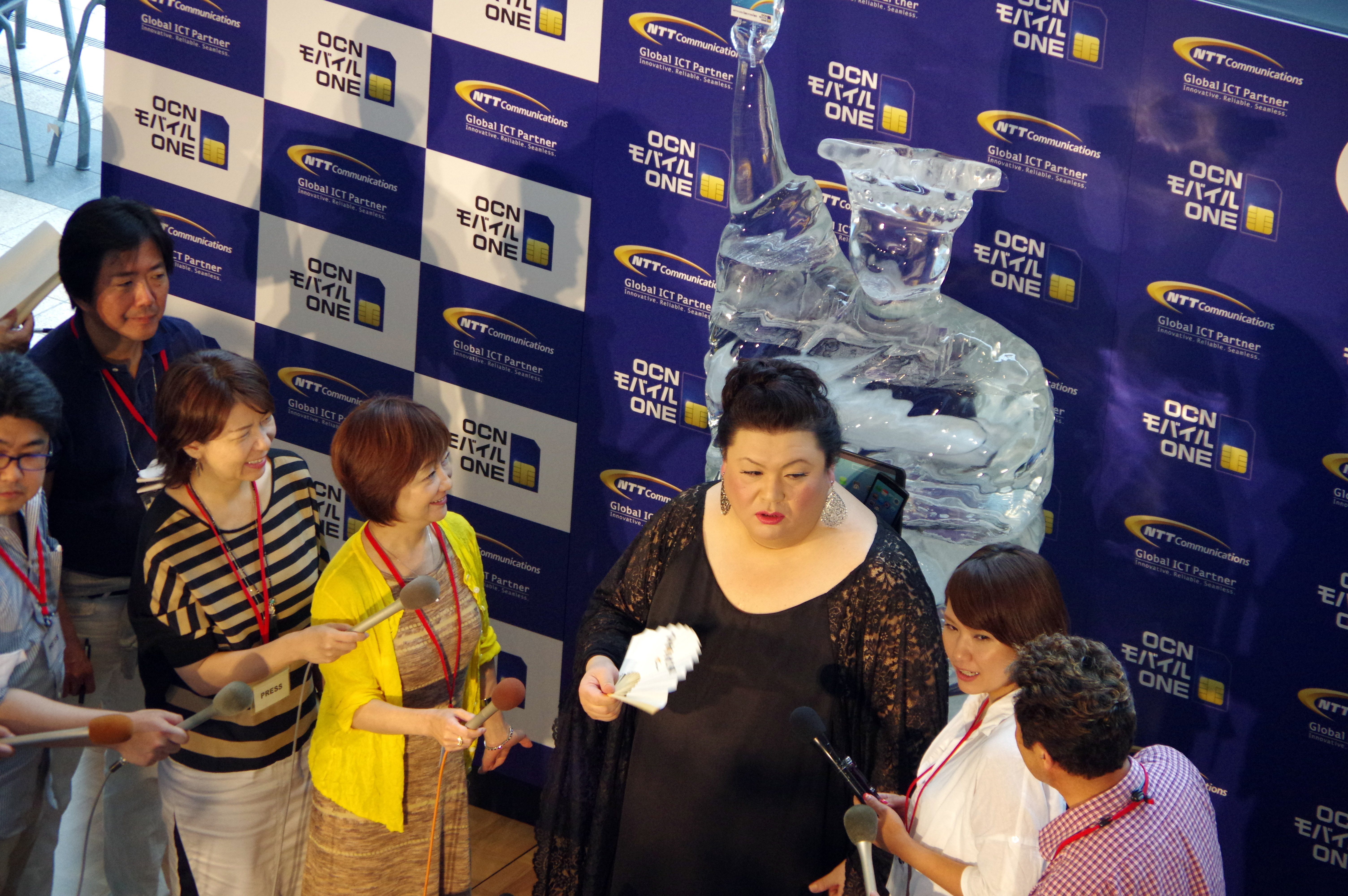 OCN モバイル ONE - マツコ・デラックス - [1] [2]